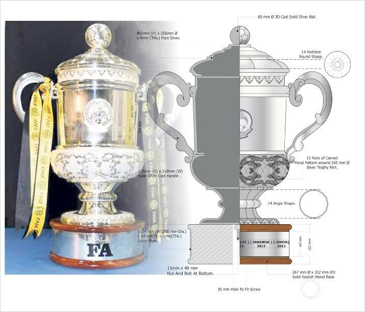 Lakaran Piala FA Malaysia yang dihasilkan oleh Ismail